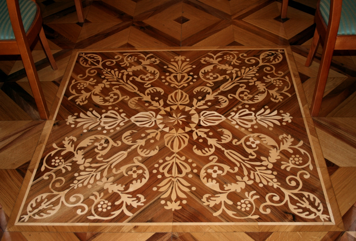 pod u Preporodnoj dvorani, Zagreb